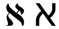 hebrew letter alef